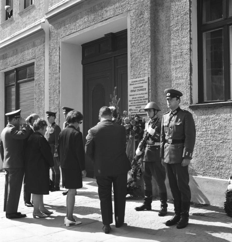 ADN-ZB / Brüggmann 13.8.1971 Berlin: Ehrung für Unteroffizier Egon Schultz. - Anlässlich des 10. Jahrestages der Errichtung des antifaschistischen Schutzwalles gedachten am 13. Aug. 1971 die Eltern, Soldaten und Offiziere der Grenztruppen sowie die Bevölkerung der DDR-Hauptstadt des am 5. Okt. 1964 bei der Ausübung seines Dienstes zum Schutz der Staatsgrenze von Westberliner Agenten ermordeten Unteroffiziers Egon Schultz.